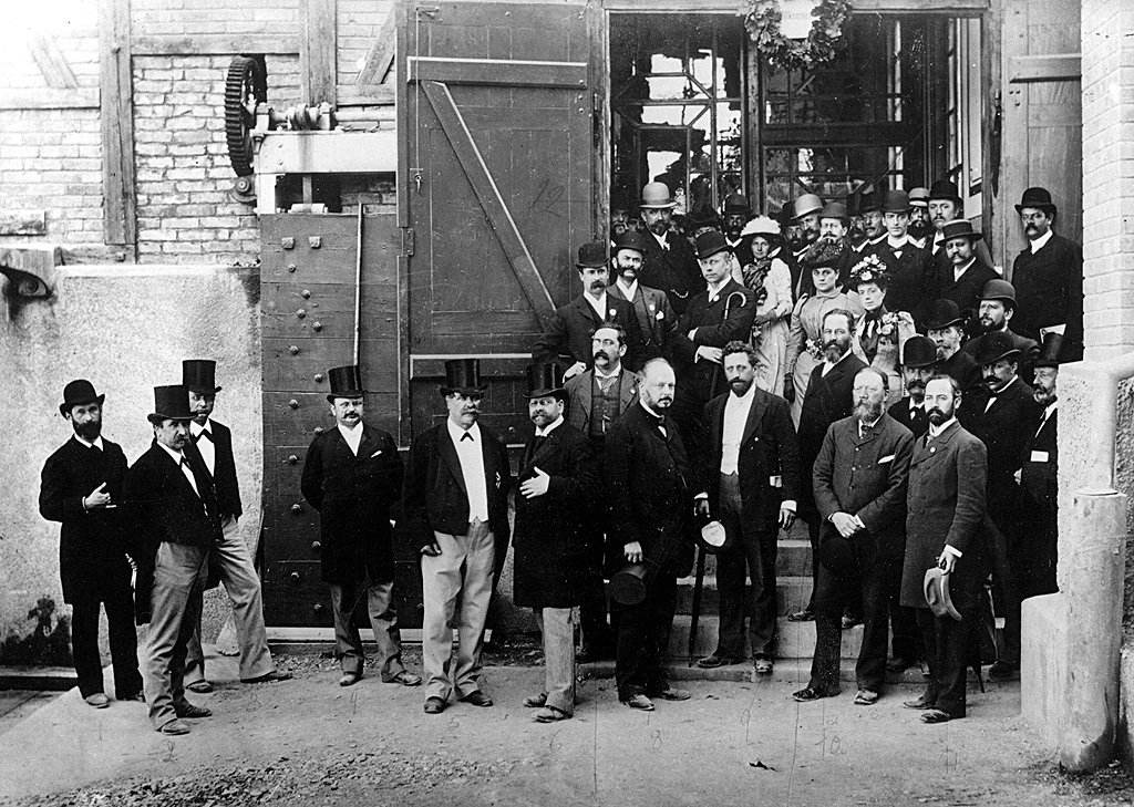 12. September 1891. Das weltweit erste Drehstrom-Kraftwerk in Lauffen am Neckar wird anläßlich der Eröffnung der Internationalen Elektrotechnischen Ausstellung in Frankfurt am Main von Prominenten besucht. Im Vordergrund: Baudirektor Karl von Leibbrand (2.v.l.), Innenminister Johann von Pischek (3.v.l), MdR Dir. Dr. Otto Arendt (4.v.l), Emil Rathenau (6.v.l.), Marcel Deprez (7.v.l.), Gisbert Kapp (hinter den beiden vorgenannten), Dr. John Hopkinson (mit heller Melone am Türstock), Charles Brown (8.v.l.), rechts dahinter Oberst Emil Huber, William Henry Preece (2.v.r), Oberpostrat Ebert (1.v.r).